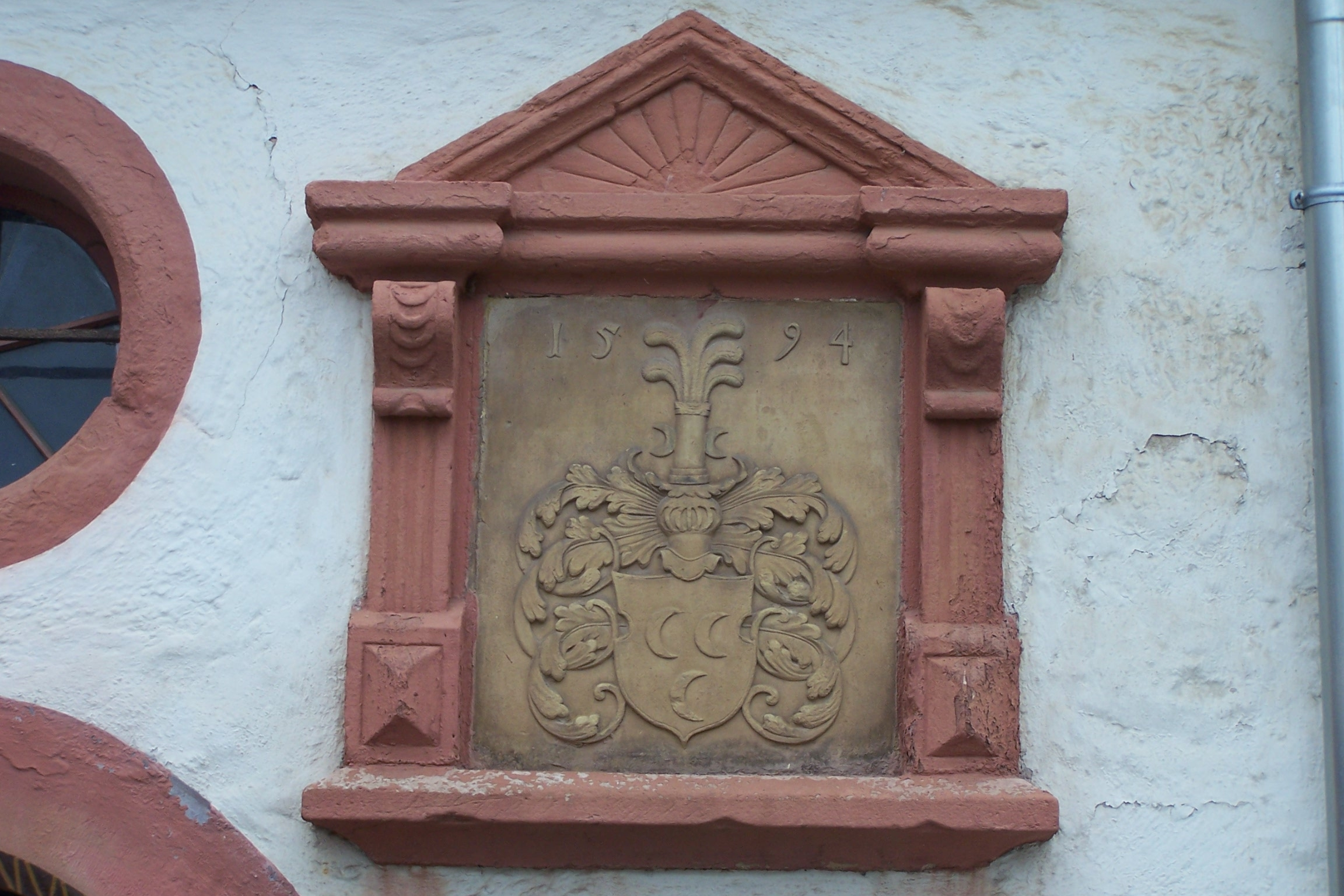 Wappentafel am Schloss von Oberellen aus dem Jahr 1594, dargestellt ist das Hansteinsche Wappen.